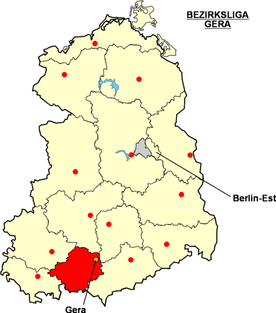 Localisation de Gera dans la "Bezirksliga Gera" Catégorie:Logo de clubs de football - Allemagne